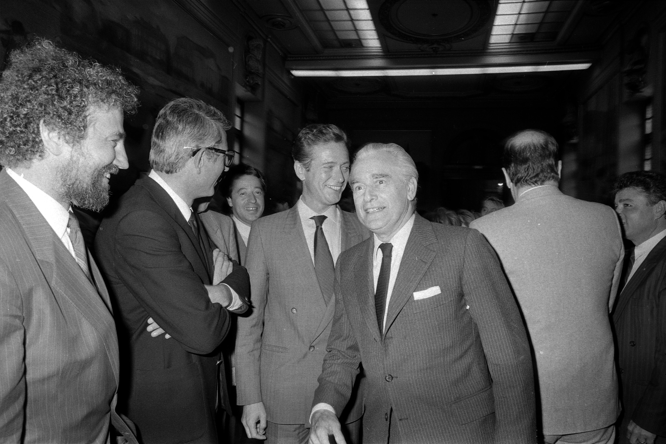 Le Capitole. Le 28 Mai 1985. Vue de A. Brouat, Jean Fabre, Dominique Baudis et Jacques Chaban-Delmas après la finale victorieuse du Stade Toulousain contre le RC Toulon.